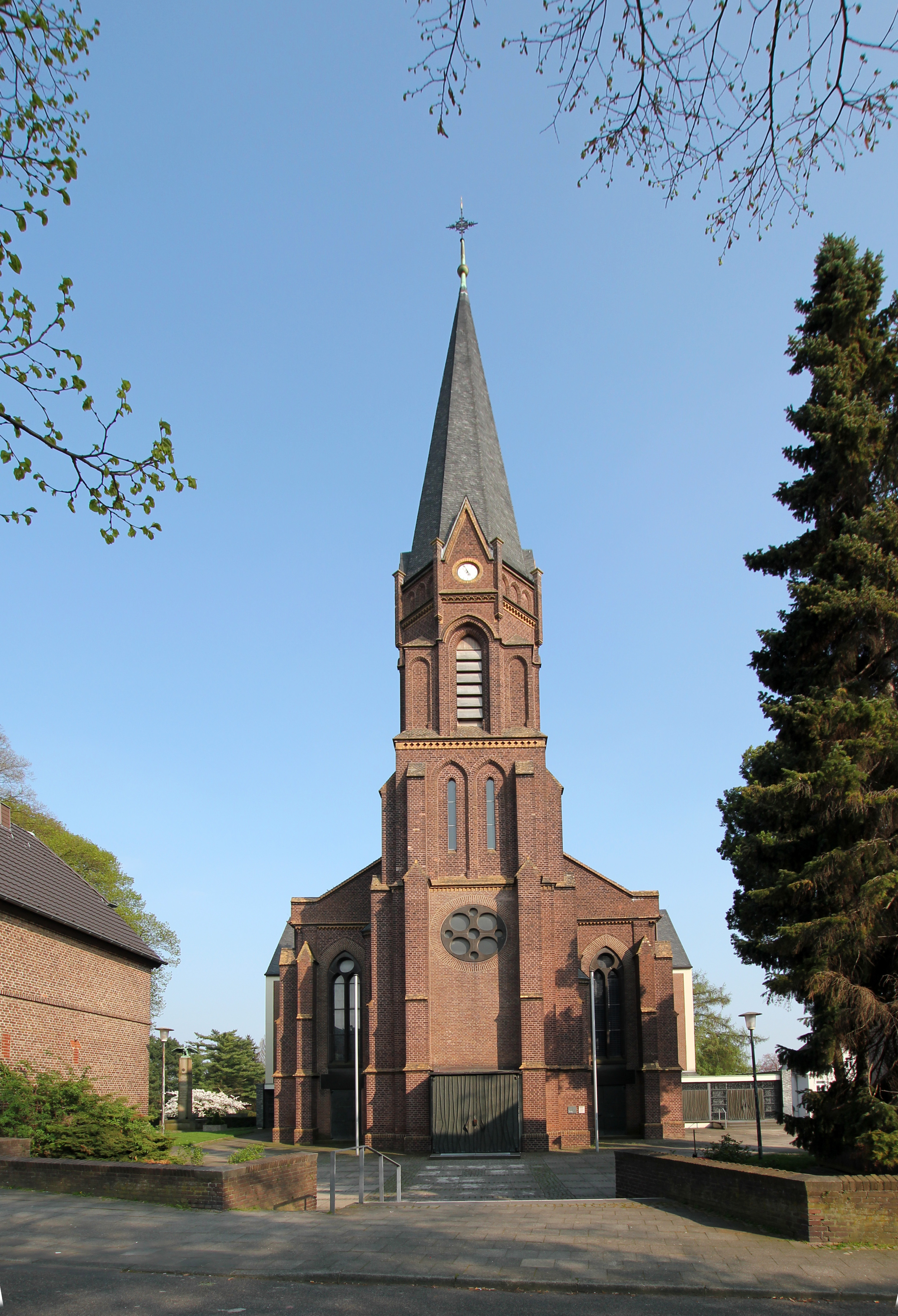 Brühl-Vochem, Sankt MatthäusI